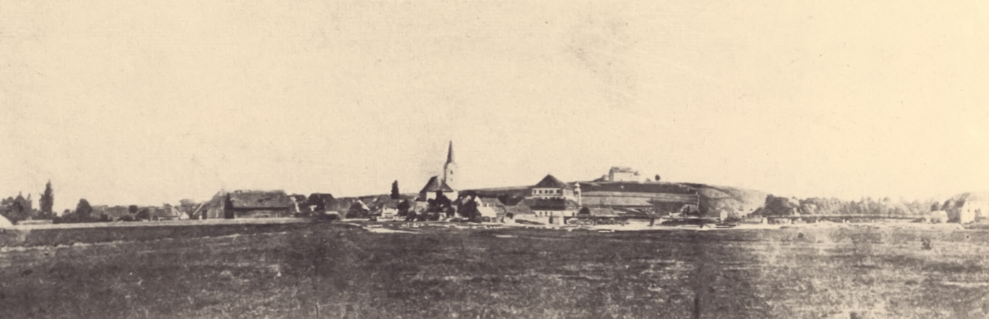 Die älteste Fotografie von Schwarzenfeld wurde im 19. Jahrhundert angefertigt. Sie zeigt die Alte Pfarrkirche, die Wallfahrtskirche auf dem Miesberg und dazwischen das alte Schloss. Rechts im Bild befindet sich der Ortsteil Hammer.